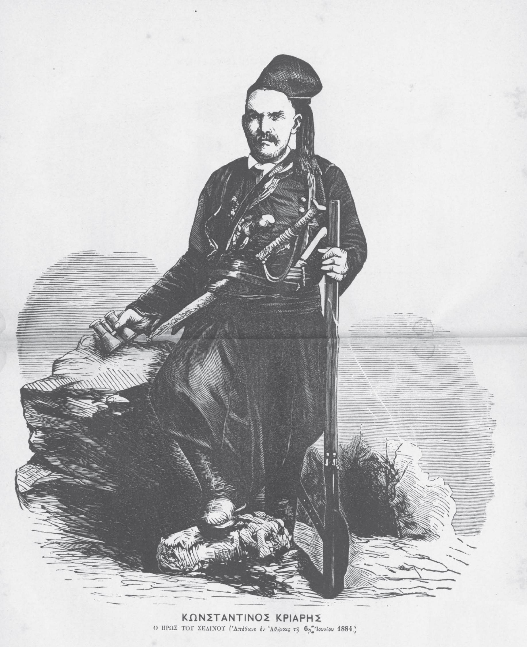 Konstantinos Kriaris, namhafte griechische Persönlichkeit, 19. Jahrhundert